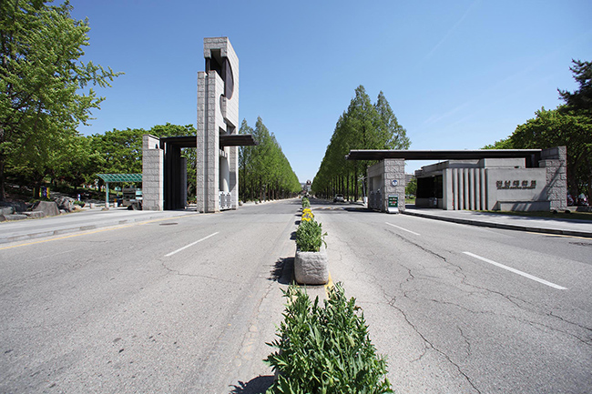 전남대학교 정문 풍경입니다.